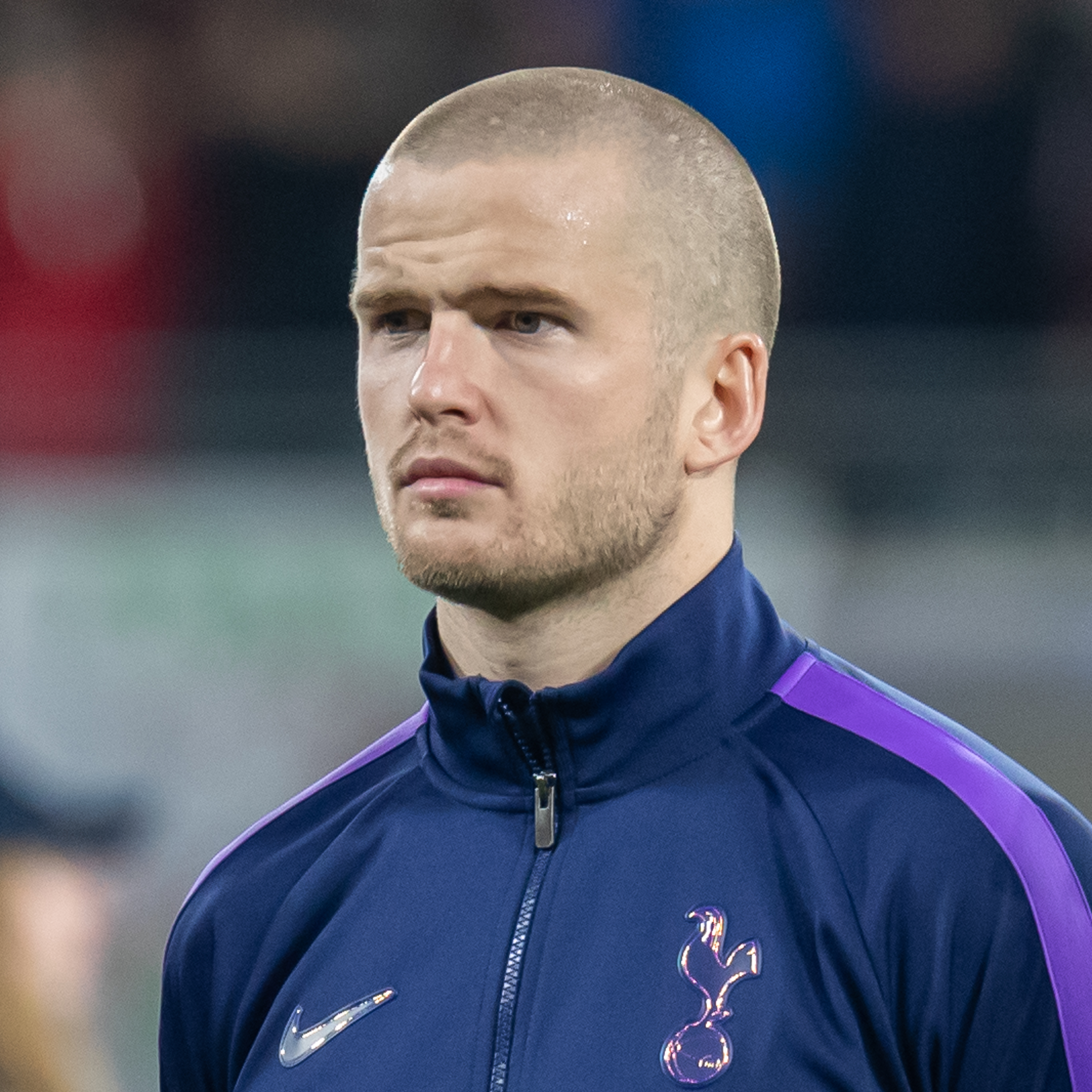 Fußball, Männer, UEFA Champions League Achtelfinale, RB Leipzig - Tottenham Hotspur; Eric Dier (Tottenham Hotspur, 15)